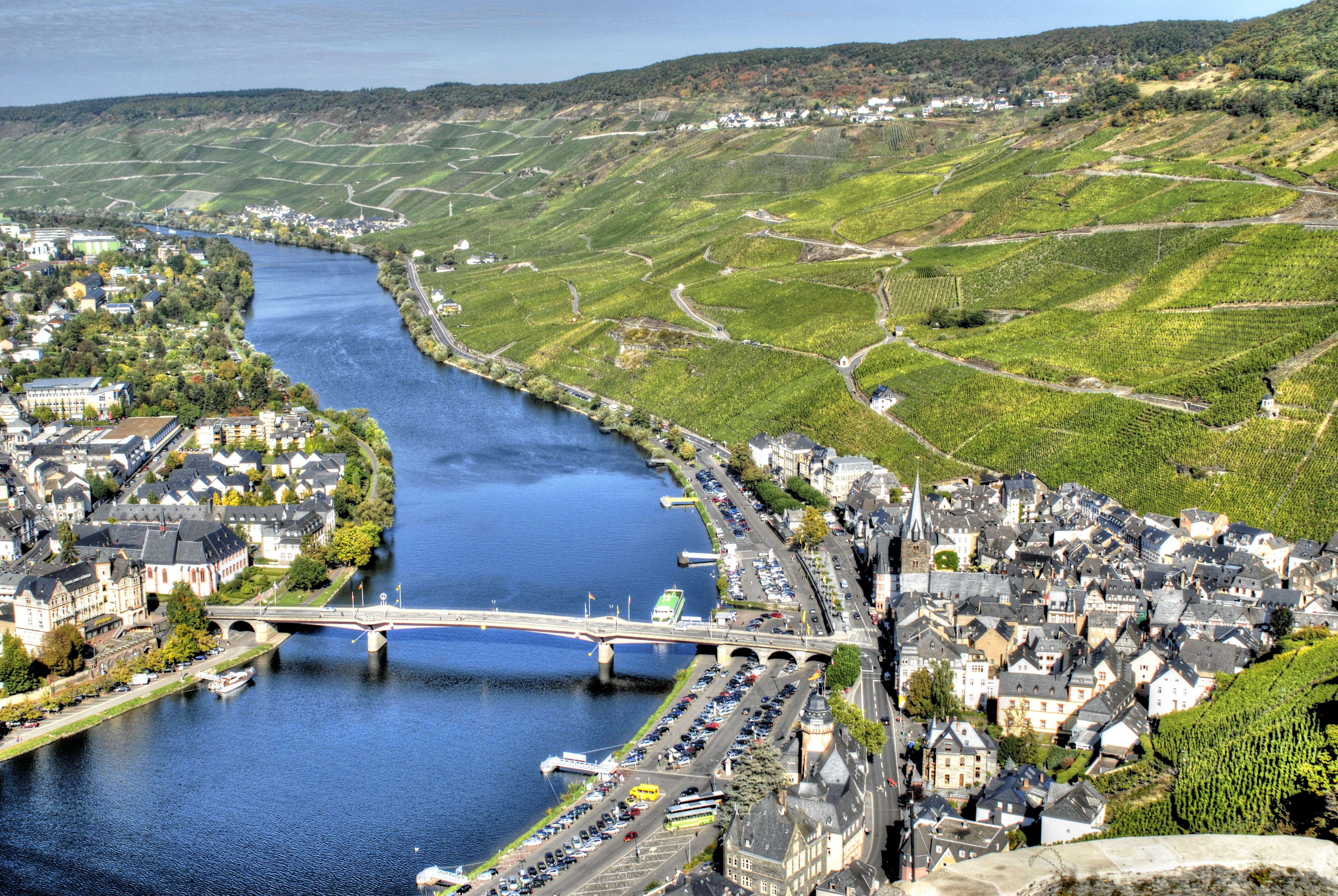 Blick von der Burg Landshut – Die Stadt Bernkastel-Kues an der Mosel mit den unendlich vielen Weinbergen